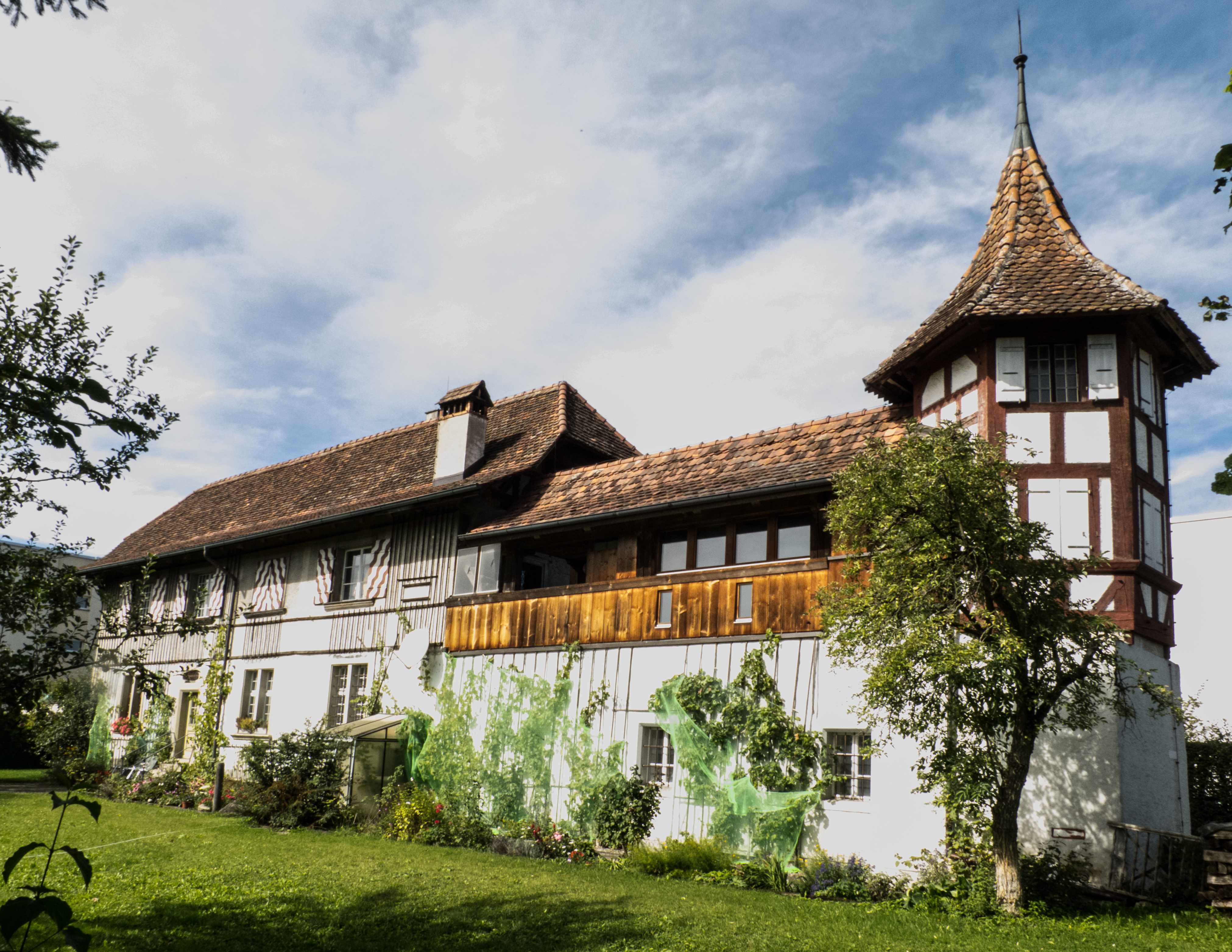 Ehemaliges Jagdschlösschen Rüfenacht (Worb)